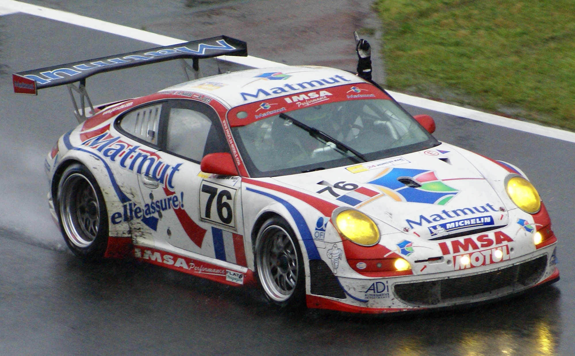 Fichier:Catégorie: Description Victoire de la porsche IMSA Performance aux 24 heures du Mans 2007 Publié sous licence Victoire de la porsche IMSA Performance aux 24 heures du Mans 2007